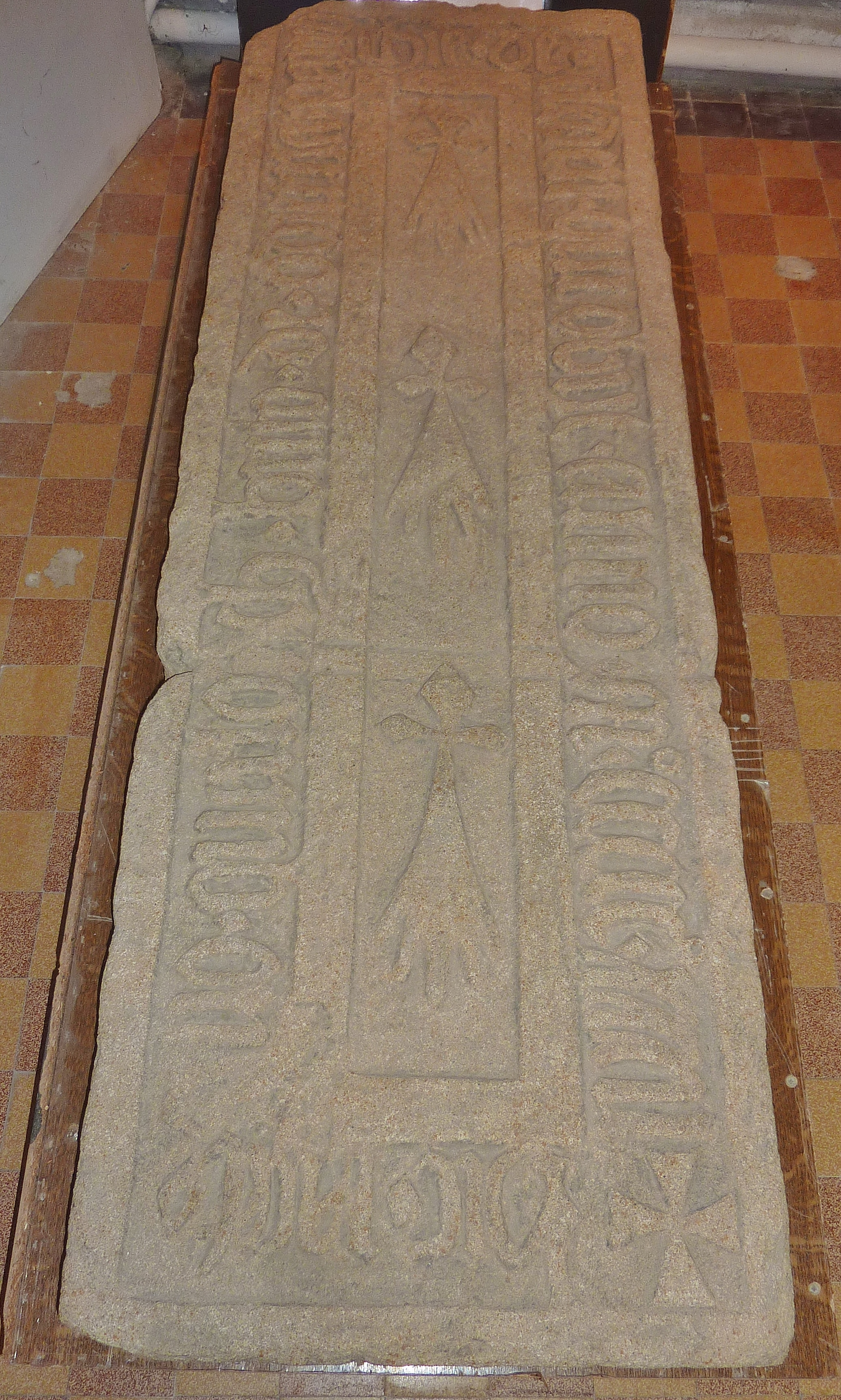 Musée d'Audierne : copie de la dalle funéraire d'Yves Kerloc'h, un marin breton d'Audierne, décédé en 1532, dont l'original se trouve dans l'hôtel de ville de Sluis (Zélande, Pays-Bas).